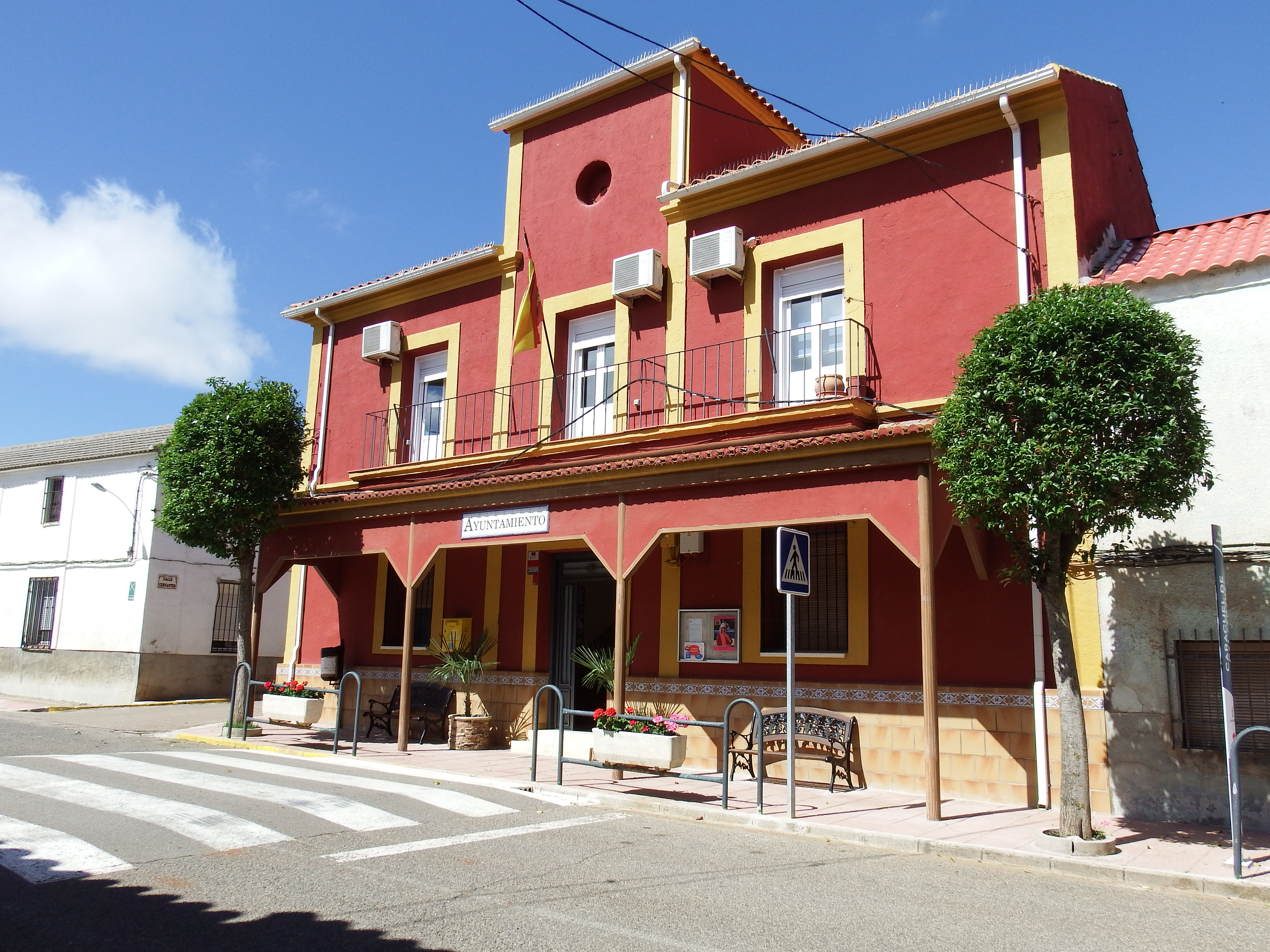 Caracuel de Calatrava